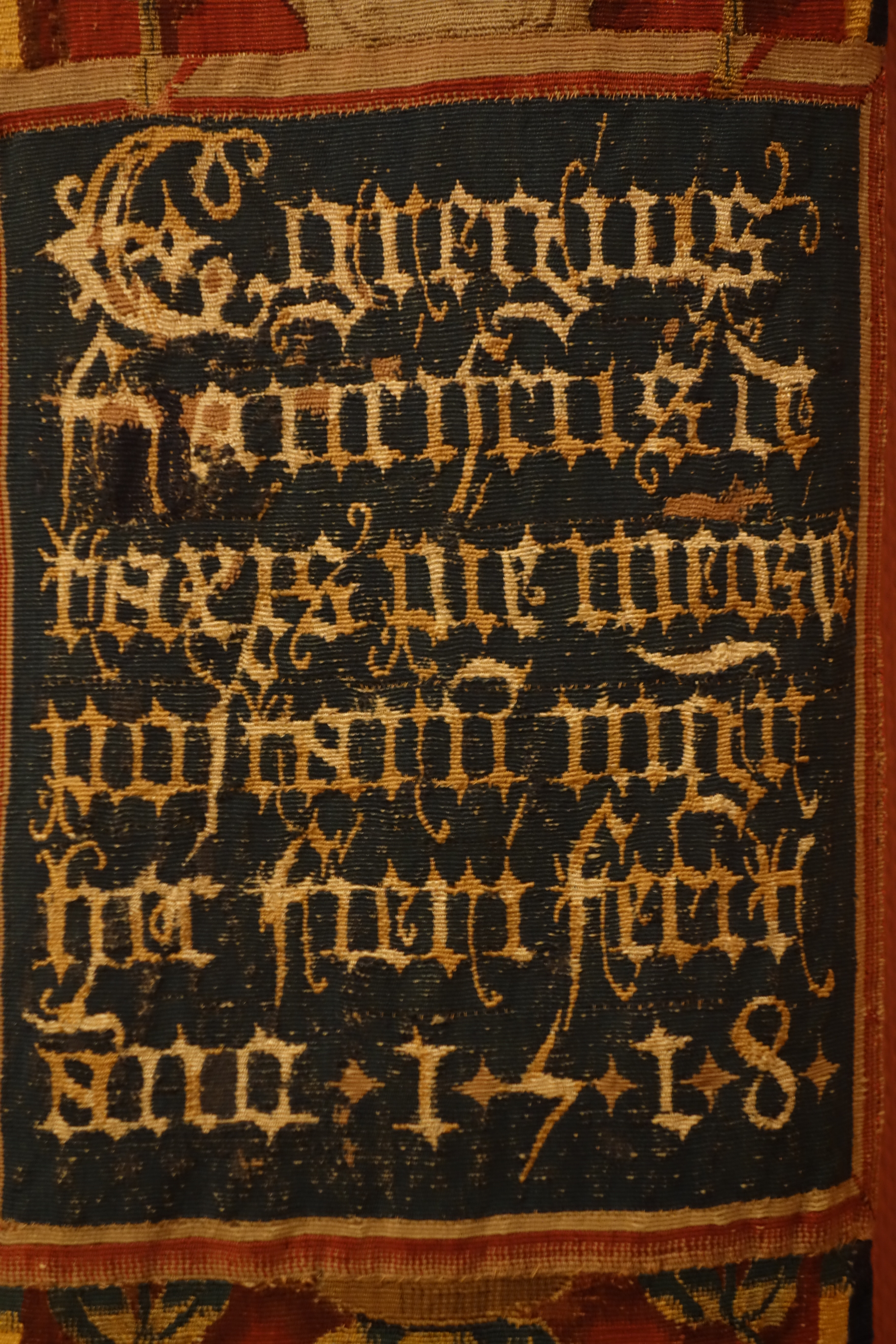 Detail uit het laatste wandtapijt van de vierdelige reeks "Onze-Lieve-Vrouw van de Zavel", toegeschreven aan de jonge Bernard van Orley.